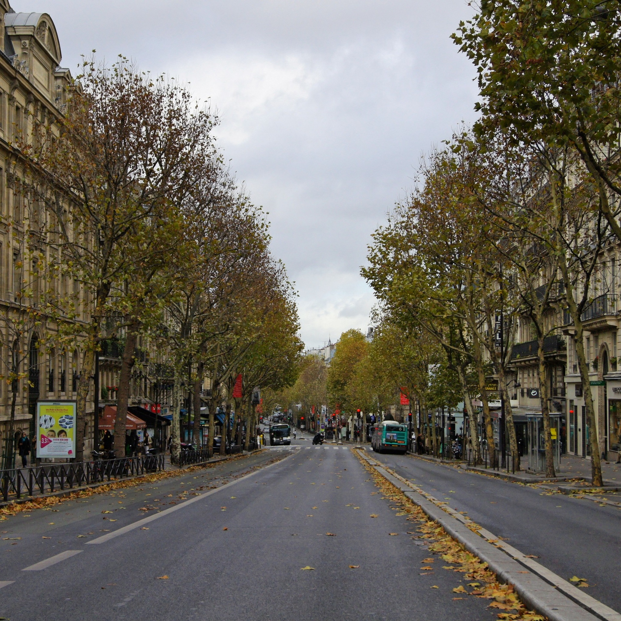 Boulevard Saint-Michel, Paris